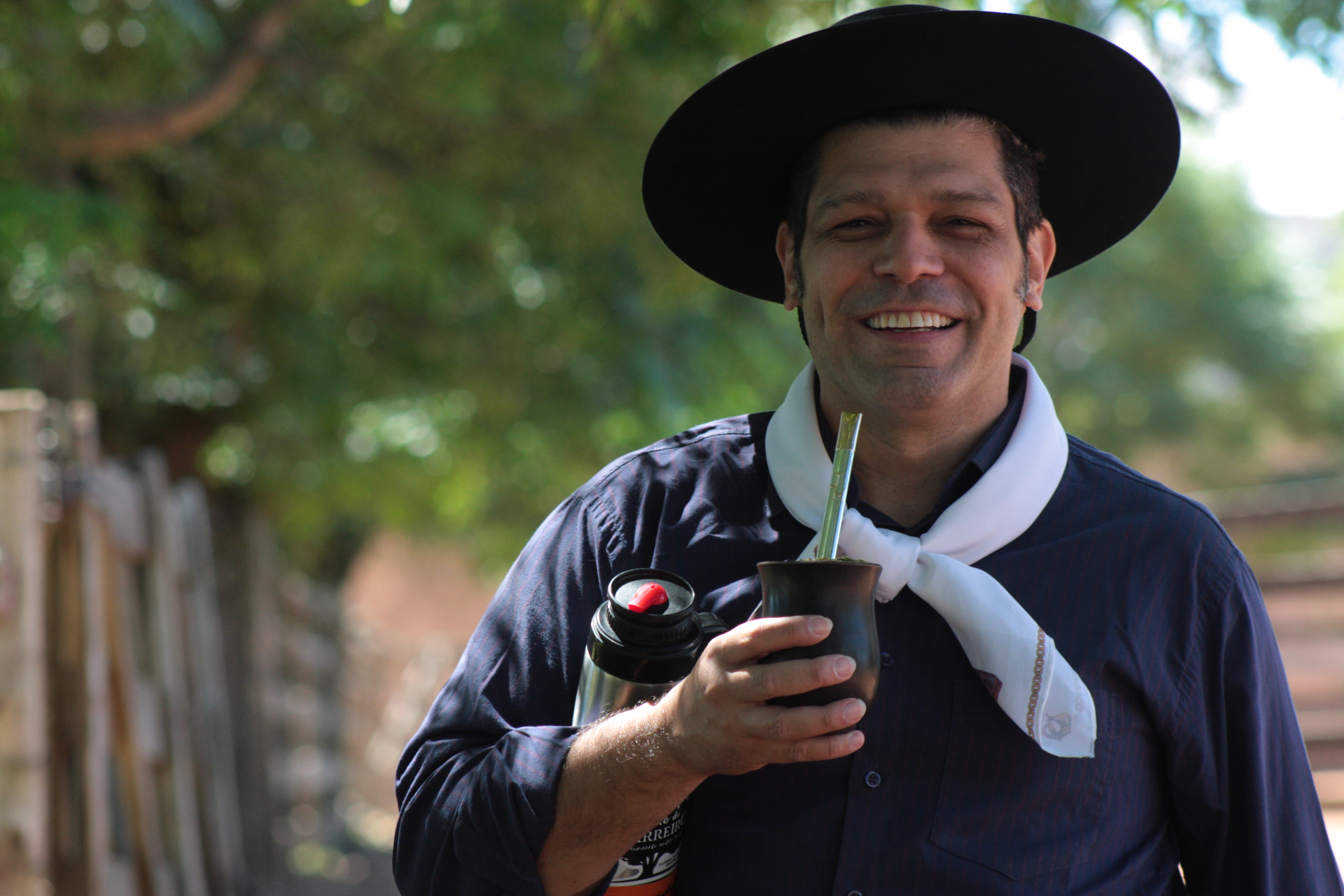 Joca Martins tomando mate